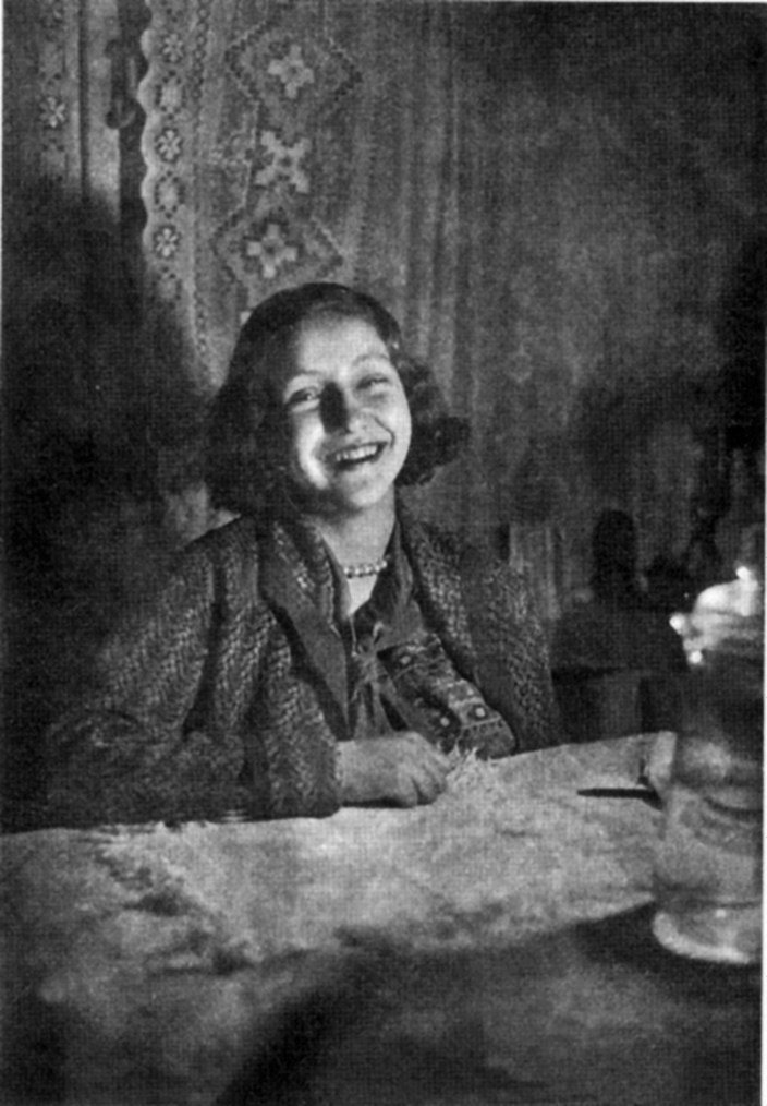 Валентина Грюнзайд, жена Евгения Петрова.